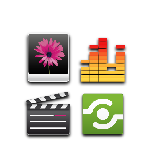 Logo Mediencenter